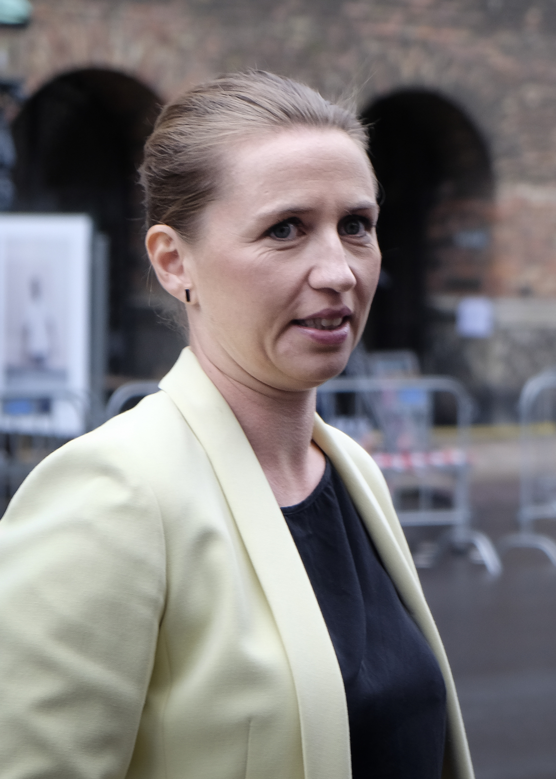 Mette Frederiksen anlÃ¤nder till valvakan pÃ¥ Christiansborg - det danska folketingsvalet 18 juni 2015. Sedan det pÃ¥ natten stod klart att det rÃ¶da blocket fÃ¶rlorat makten meddelade socialdemokraternes partiledare Helle Thorning-Schmidt att hon avgÃ¥r bÃ¥de som partiledare och statminister. Strax bÃ¶rjade spekulationerna om att Mette Frederiksen kommer att bli socialdemokraternas nya partiledare. Photo: News Ãresund - Johan Wessman Â© News Ãresund(CC BY 3.0) Detta verk av News Ãresund Ã¤r licensierat under en Creative Commons ErkÃ¤nnande 3.0 Unported-licens (CC BY 3.0). Bilden fÃ¥r fritt publiceras under fÃ¶rutsÃ¤ttning att kÃ¤lla anges. The picture can be used freely under the prerequisite that the source is given. News Ãresund, MalmÃ¶, Sweden. . News Ãresund Ã¤r en oberoende regional nyhetsbyrÃ¥ som Ã¤r en del av det oberoende dansk-svenska kunskapscentrat Ãresundsinstituttet.